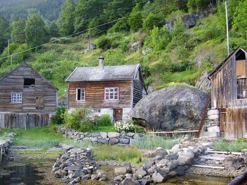 Bilde frå naustmiljøet inst i vika på Tjoflot.